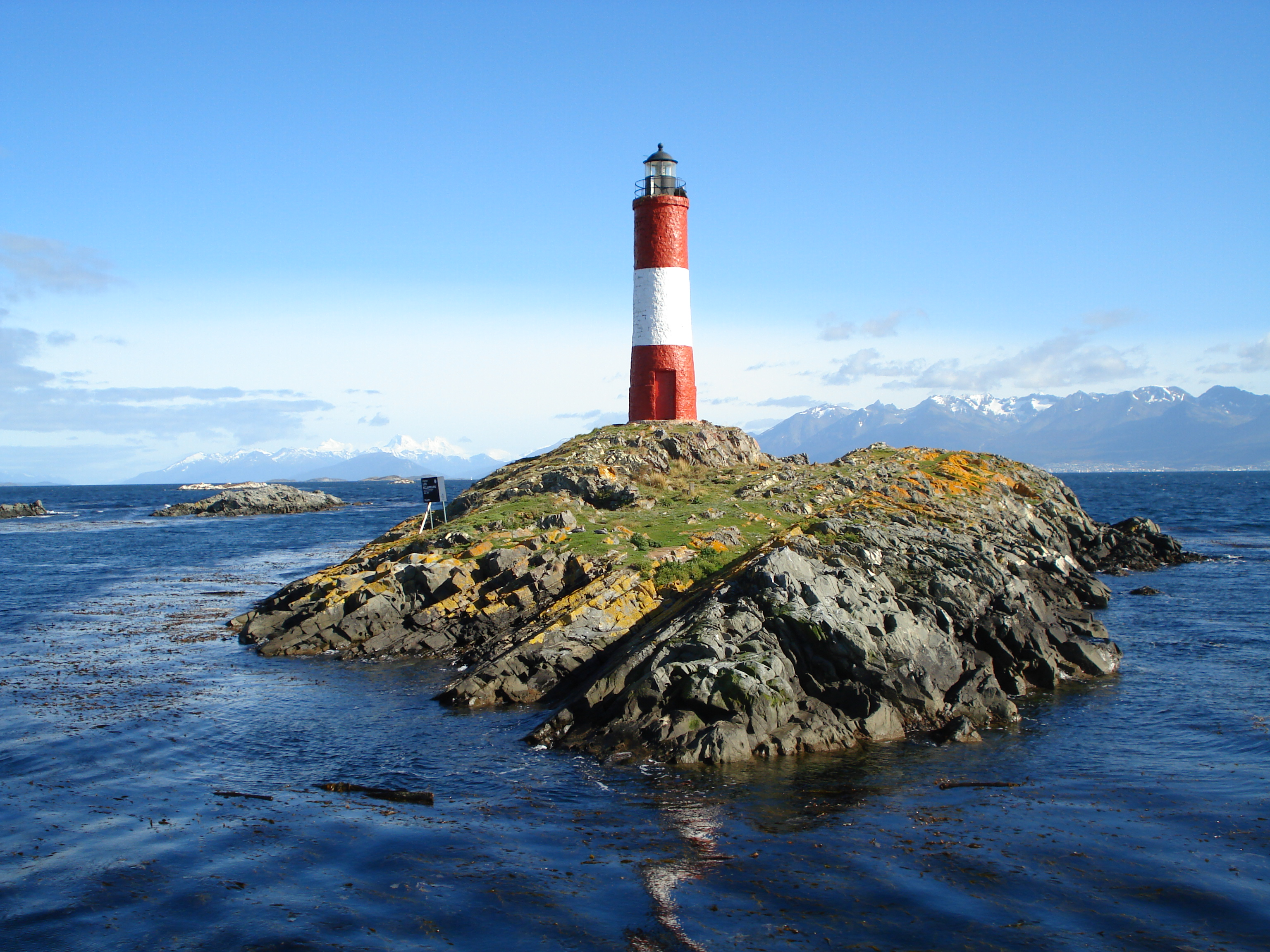 este faro comenzó a construirse el día 19 de diciembre de 1918 y se termina el de 23 de enero de 1919. Se ubica sobre uno de los islotes Les Esclaireus en el Canal de Beagle al sur de Tierra del Fuego. Su situación geográfica es de 54º 52' S, 68º 05' W. Posee una torre troncocónica con garita y 3 franjas rojas y blancas, con una altura de 11 m, y una elevación sobre el nivel del mar de 22,5 msnm . El nombre del faro deriva de los islotes en donde está ubicado, y fue impuesto por el Capitán de fragata Luis Fernando Martial, bajo las ordenes de la expedición francesa de "La Romanche" en los años 1882-1883. Este relevamiento fue organizado por la Academia Nacional de Ciencias de Francia y la Marina Francesa. in (Castellano) See where this picture was taken. [?]